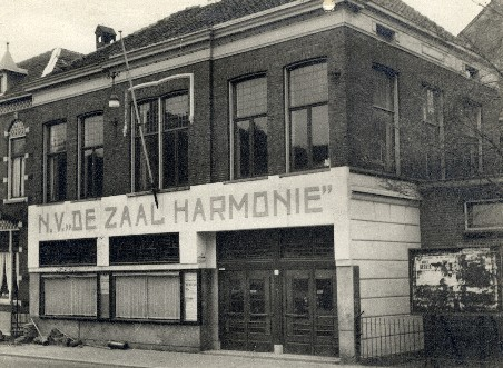 Harmonie zaal buiten